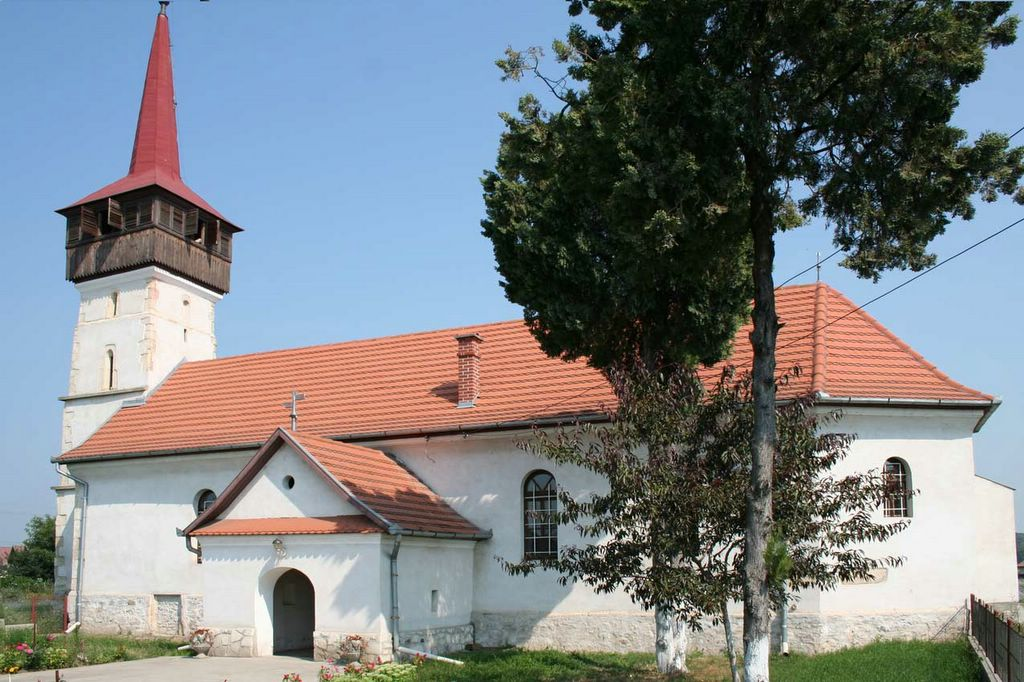 Biserica Reformata-Calvina, Turda-Poiana